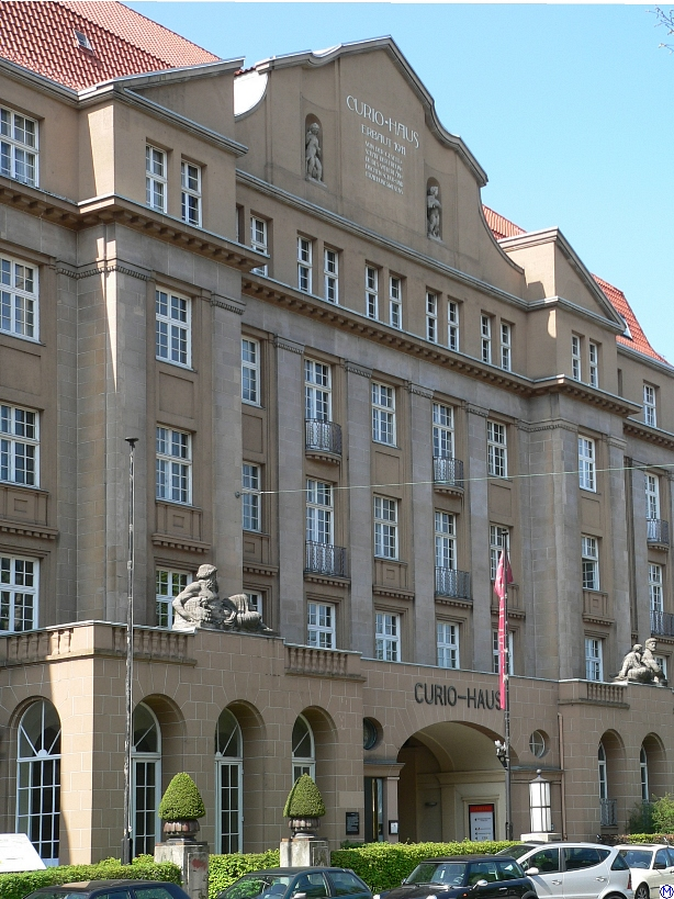 Curiohaus in Hamburg, Rotenbaumchaussee 21.4.2005